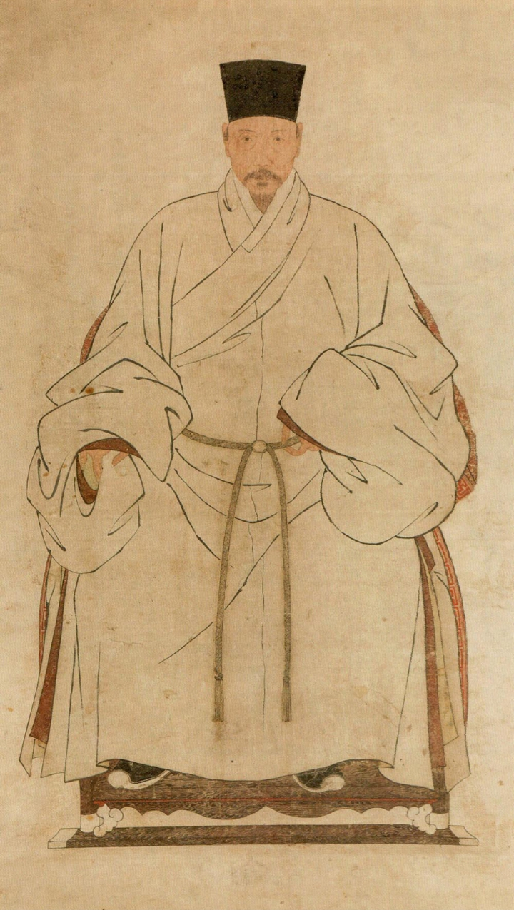 中文（香港）: 明代寫實容像